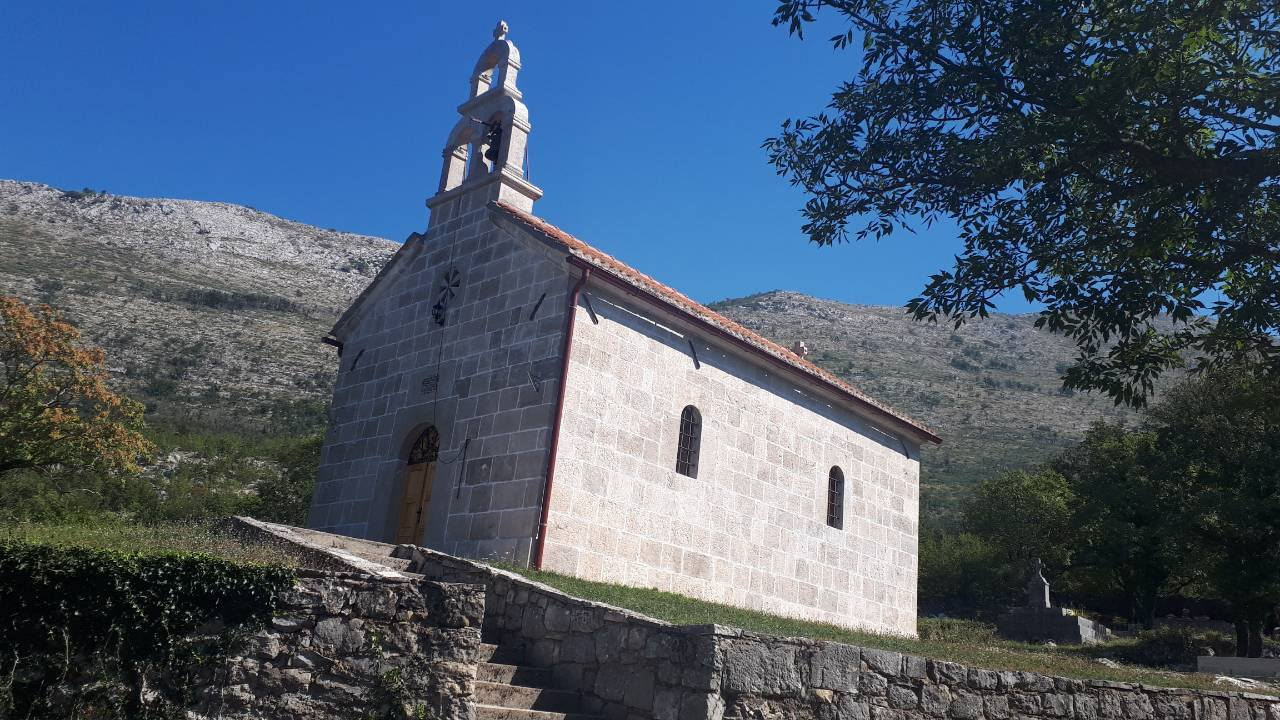 Храм Св. пророка Илије